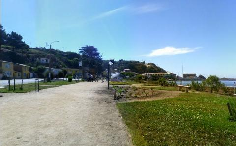 Vista del balneario de Bucalemu, región de O'Higgins, Chile.